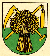 Wappen von Cremin Kanton Waadt Schweiz